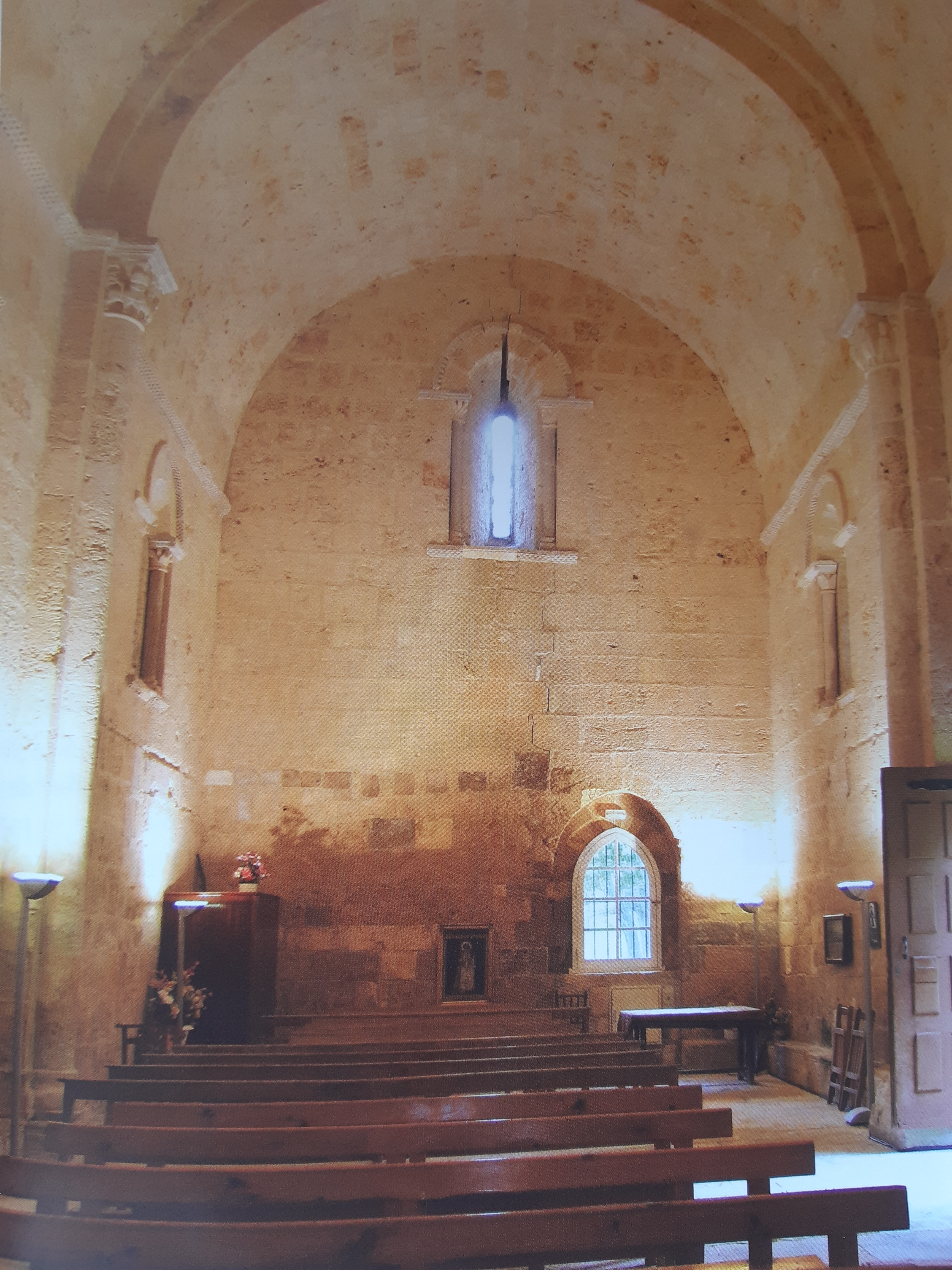 Es el interior de la ermita burgalesa de Nuestra Señora del Valle. Es un cenobio del siglo XII románico ojival bizantino. Se encuentra en La Bureba.